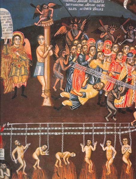 Страшный суд Конец XVIII в. Пошехонье